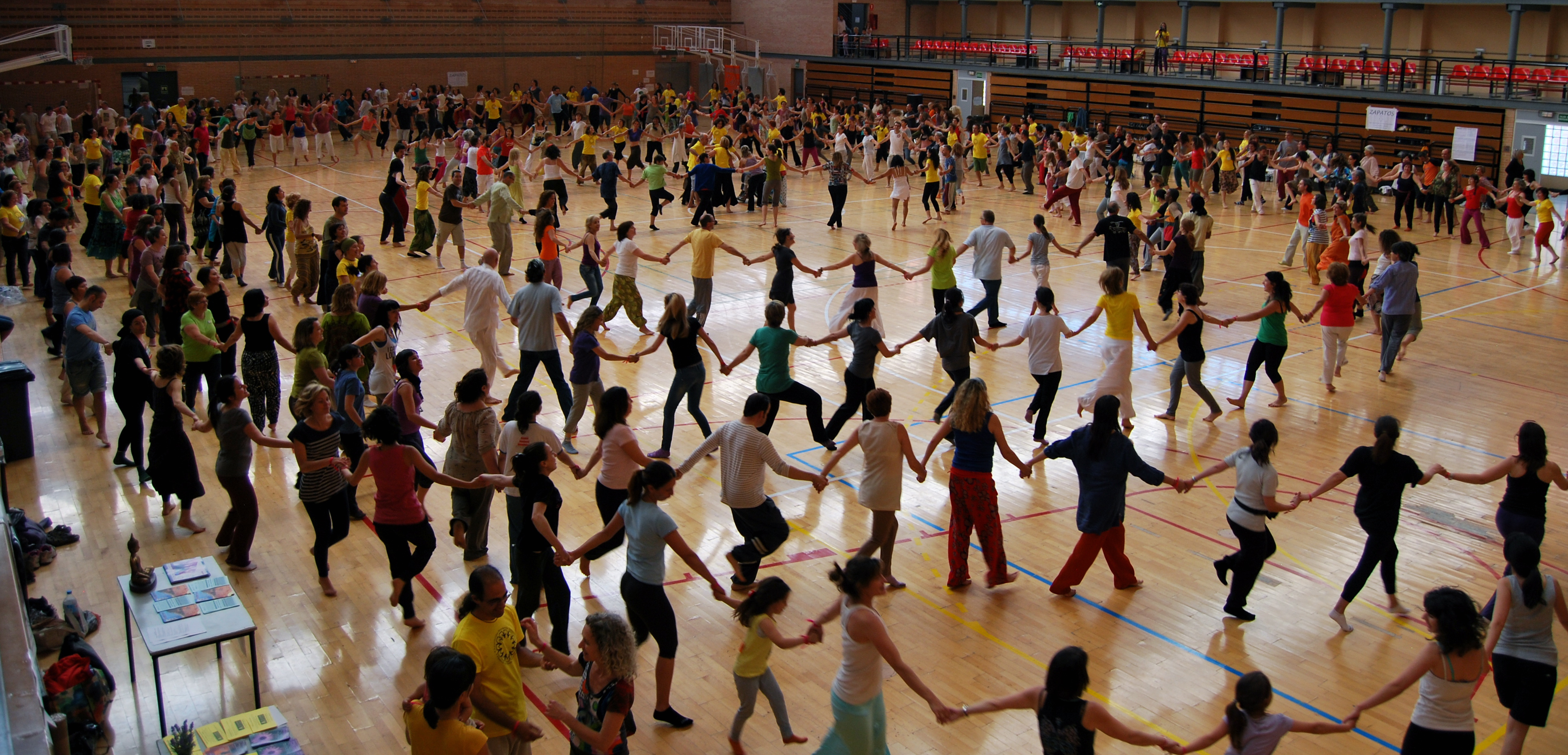 Ronda del primer festival Biodanza Valencia en el que participaron casi quinientas personas en mayo del 2012